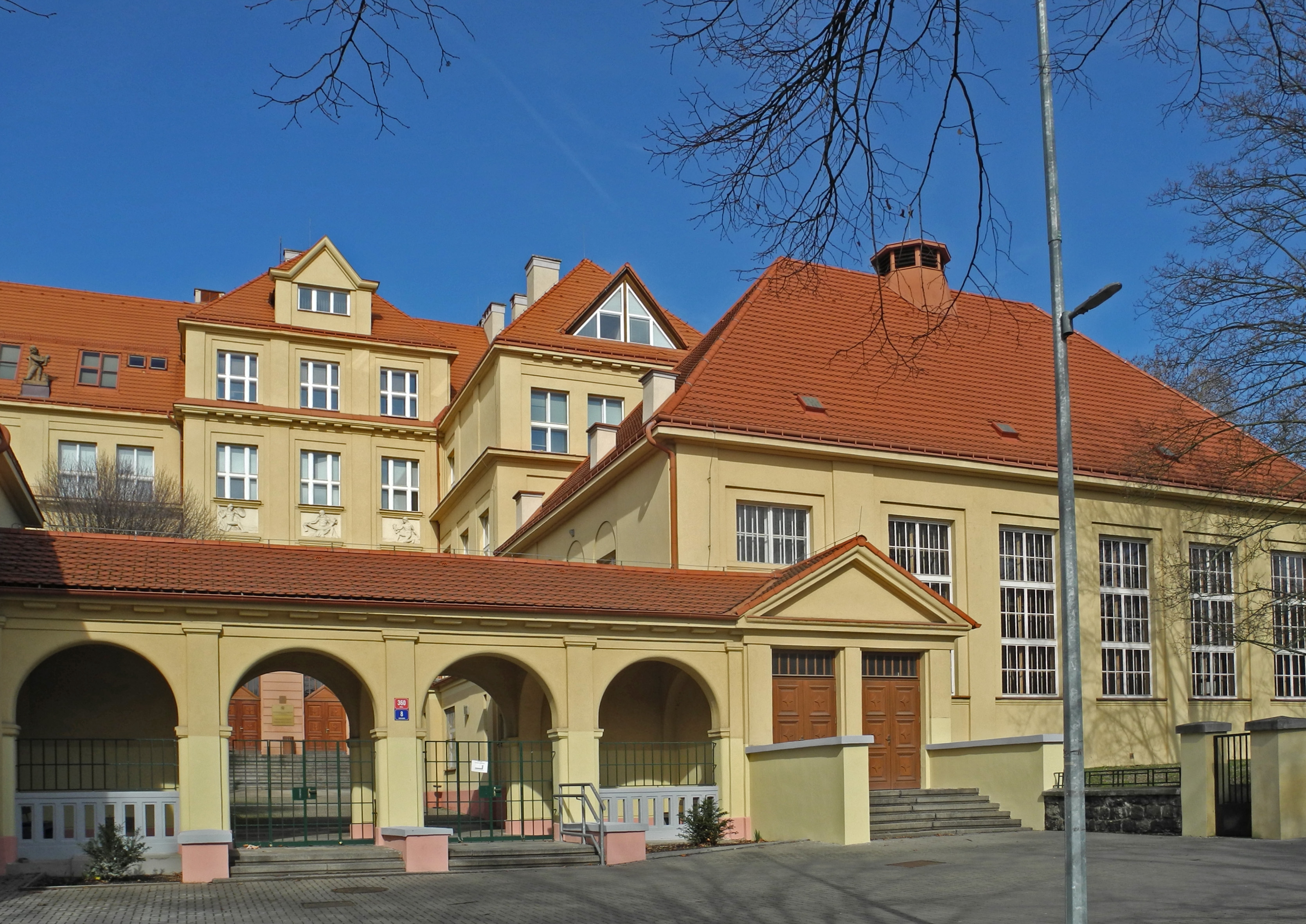 Pädagogische und Naturwissenschaftliche Fakultät der Universität Jan Evangelista Purkyně in Aussig – Ústí nad Labem, České mládeže 360/8. Ehem. Realgymnasium, Architekt: Zdeněk Pštross (1926)